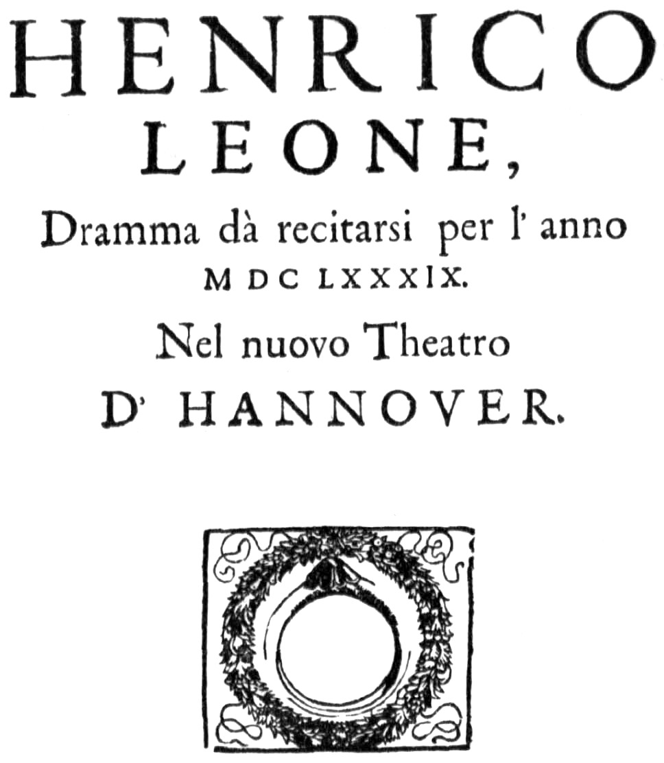 Titelseite des Librettos der Oper Enrico Leone von Ortensio Bartolomeo Mauro (Libretto) und Agostino Steffani (Musik) aus dem Jahre 1689, komponiert für die bevorstehende Einweihung des neuen Theaters am Hof zu Hannover (Leineschloss).